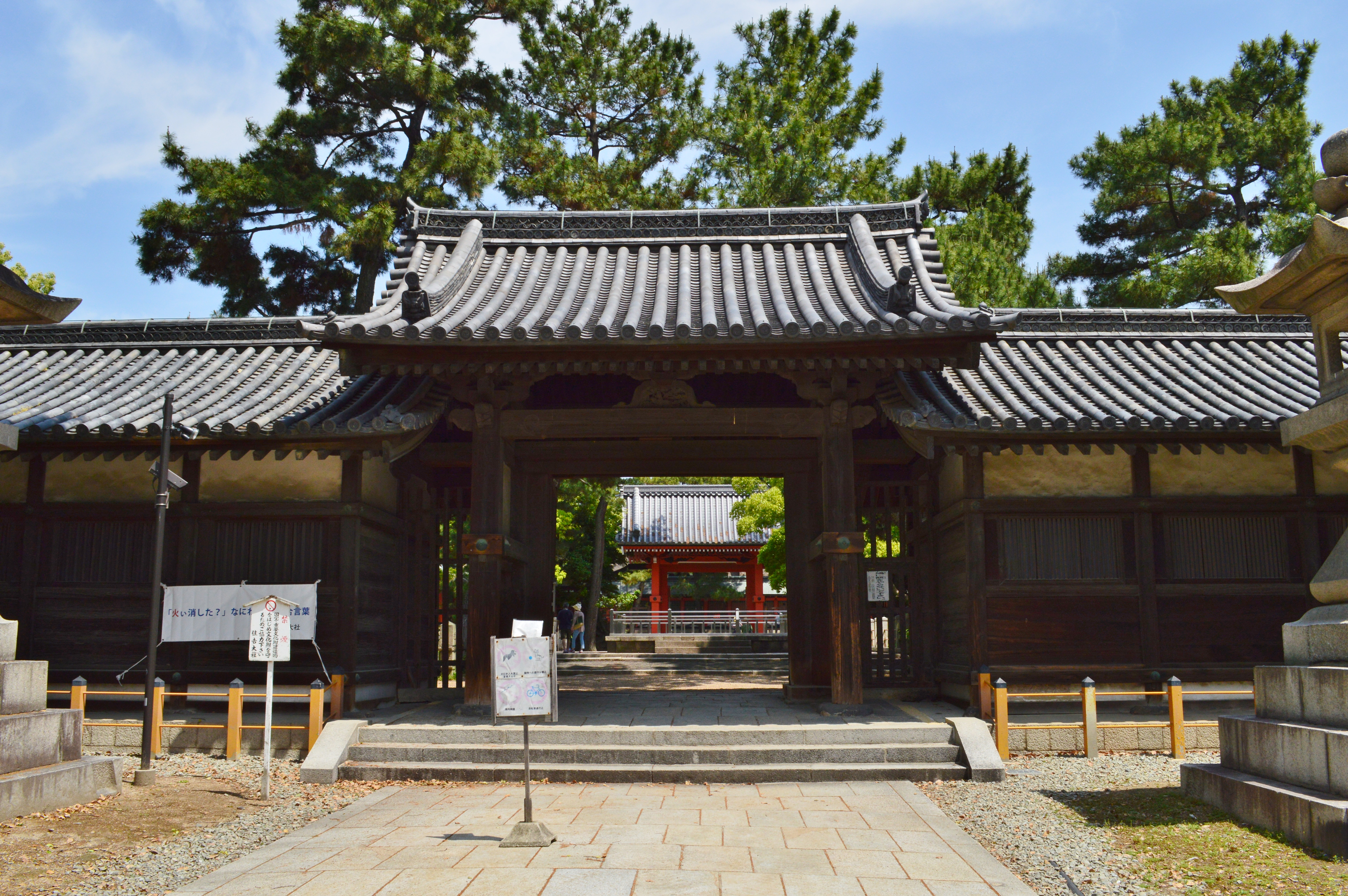 住吉大社 南門